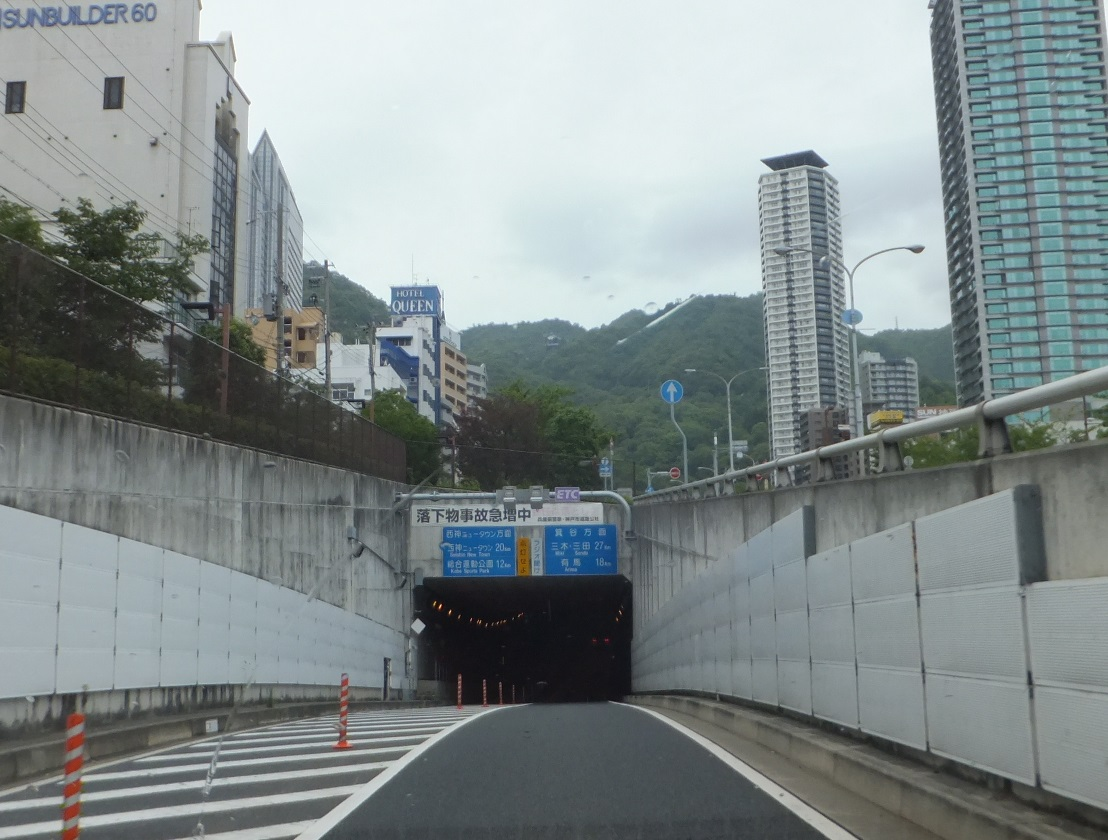 新神戸トンネル二宮入口